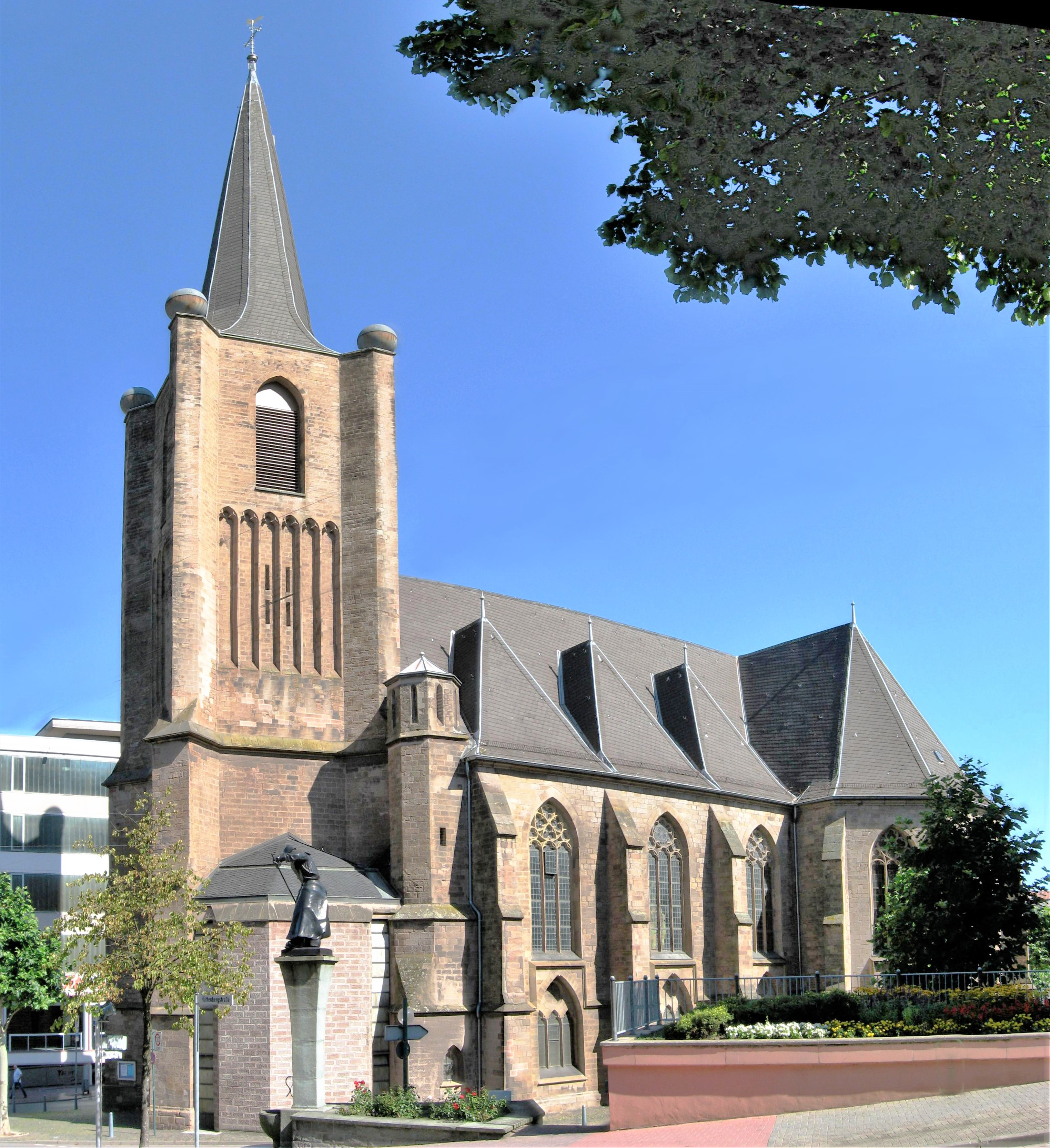 Evangelisches Gemeindezentrum, Christuskirche in Neunkirchen. Die Christuskirche war eine Stiftung von Carl Ferdinand von Stumm-Halberg an die evangelische Gemeinde und ist auf dem Wappen der Stadt abgebildet